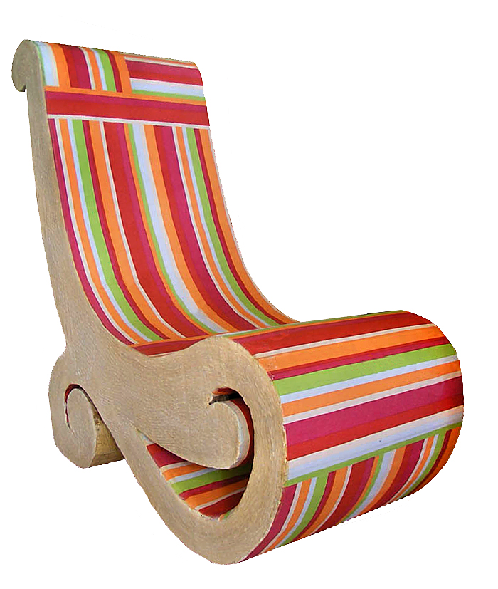 Meuble en carton - Graine de carton - Fauteuil relax à rayure